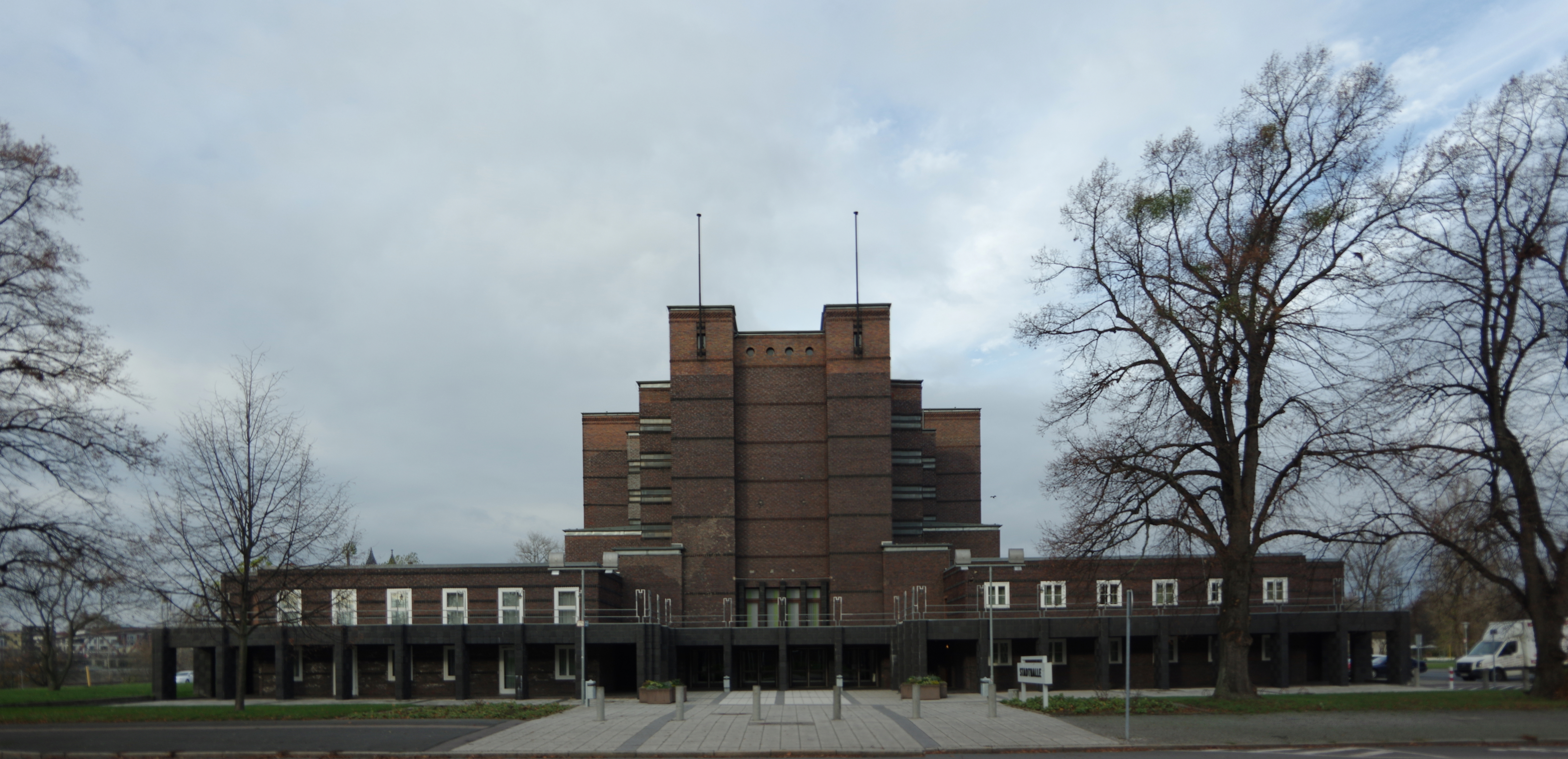 Magdeburg in Sachsen-Anhalt. Die Stadthalle im Stadtteil Werder ist denkmalgeschützt.